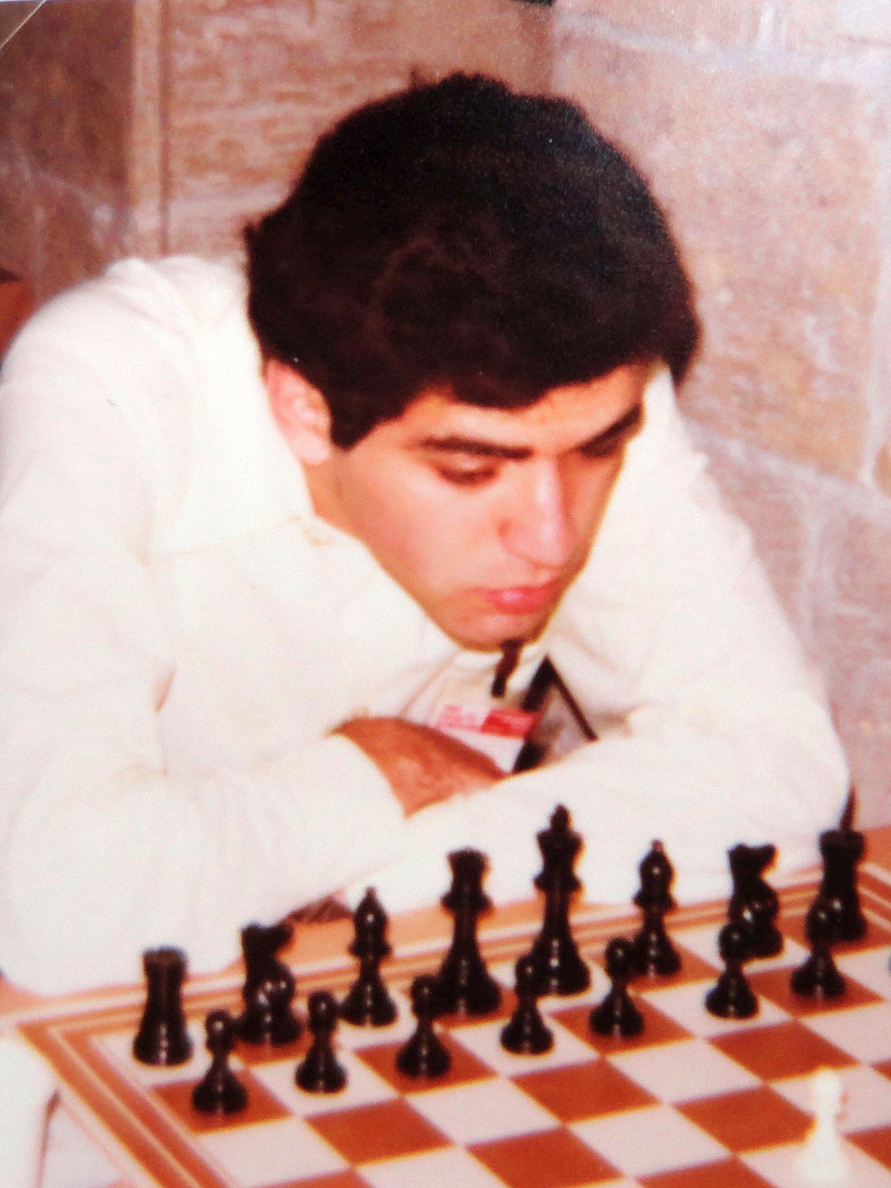 Garry Kasparov, Schacholympiade 1980 in Valletta auf Malta.